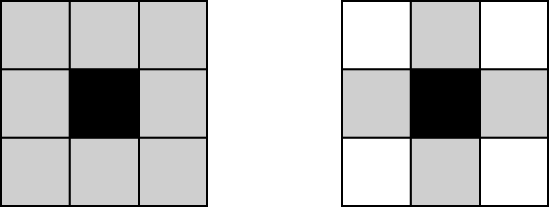 Przykładowe sąsiedztwo pikseli - ośmiospójne oraz czterospójne.